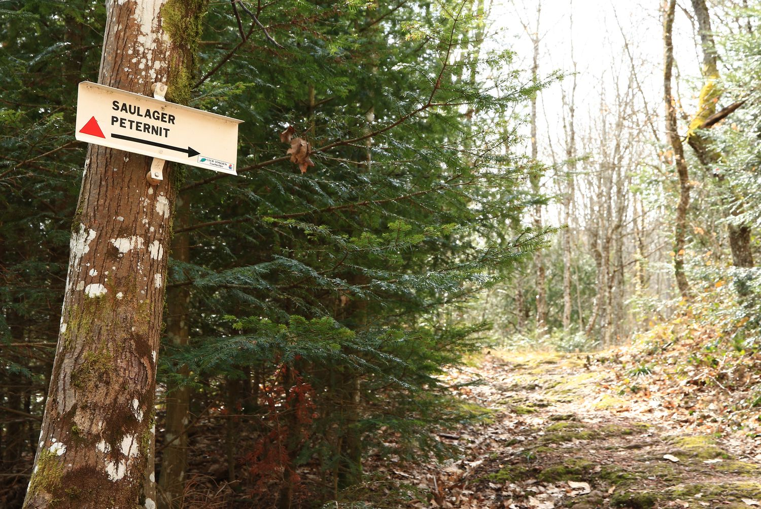 Prendre sentier à droite.